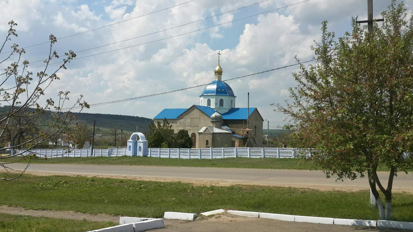 Село Новоукраинка. Церковь.